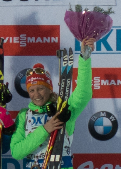 Franziska Hildebrand efter en 3:e plats vid jaktstarten i Östersund 2015